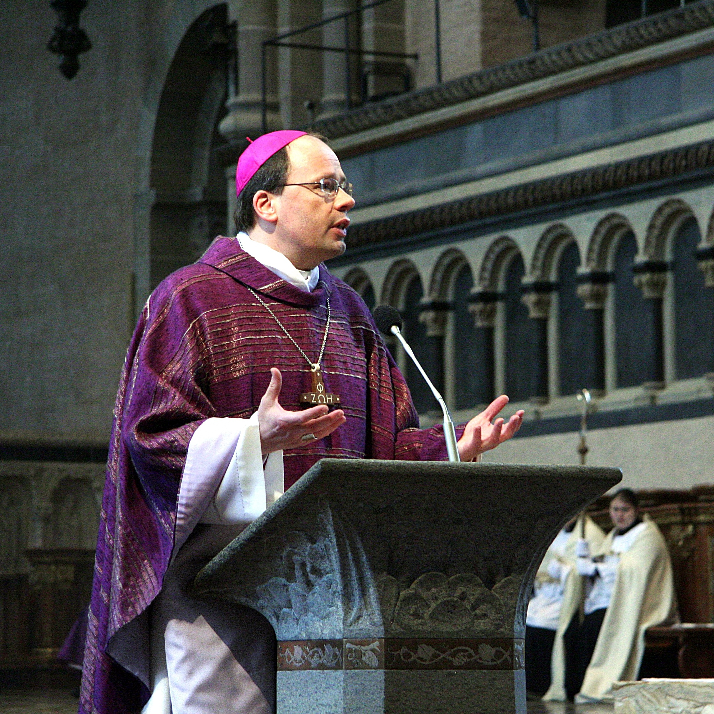 Stephan Ackermann wenige Wochen vor der Ernennung zum Bischof von Trier